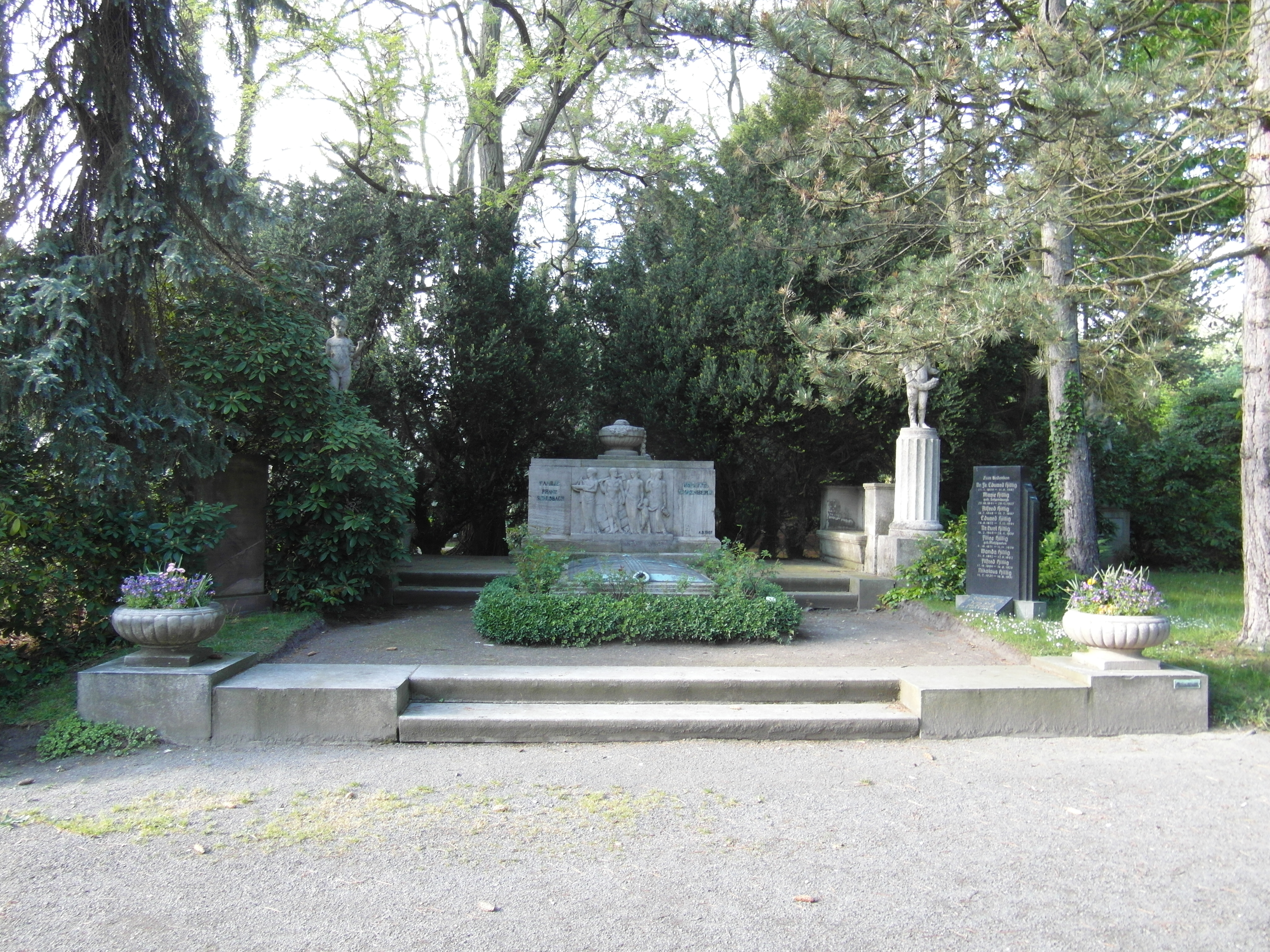 Grabstätte Familie Schlohbach Böhlitz-Ehrenberg